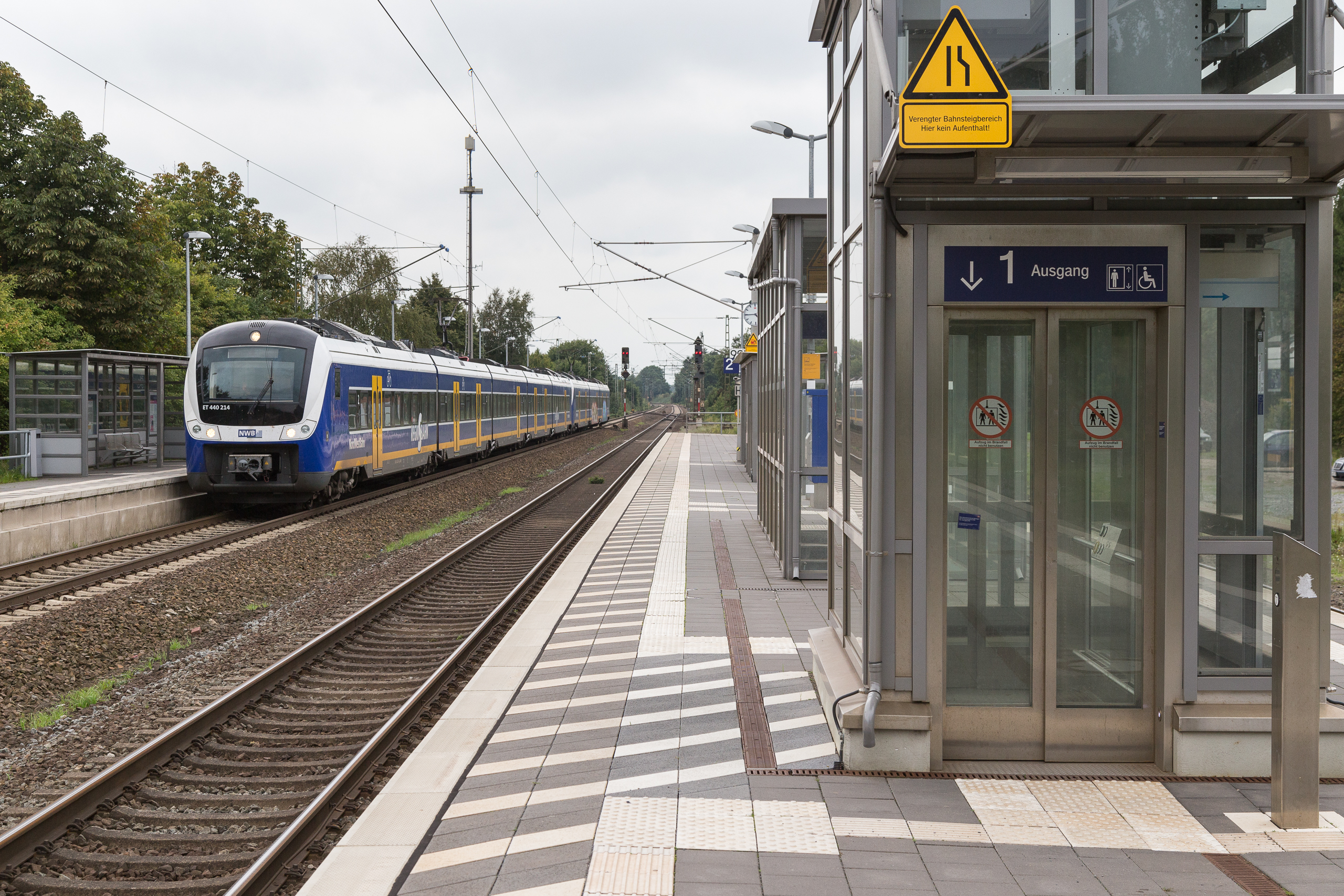 Bahnhof bzw. Haltestelle Etelsen an der Strecke Bremen-Hannover